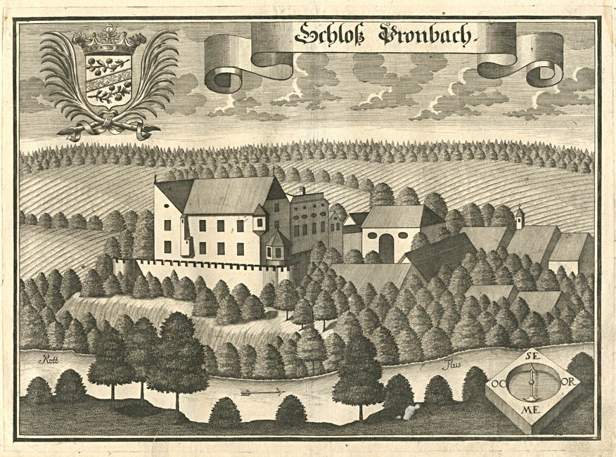 “Schloß Pronbach”, Schloß Brombach, aus: Beschreibung des Churfürsten- u. Hertzogthumbs Ober- und Nidern Bayrn. Rentamt Landshut, Gericht Pfarrkirchen, 1723